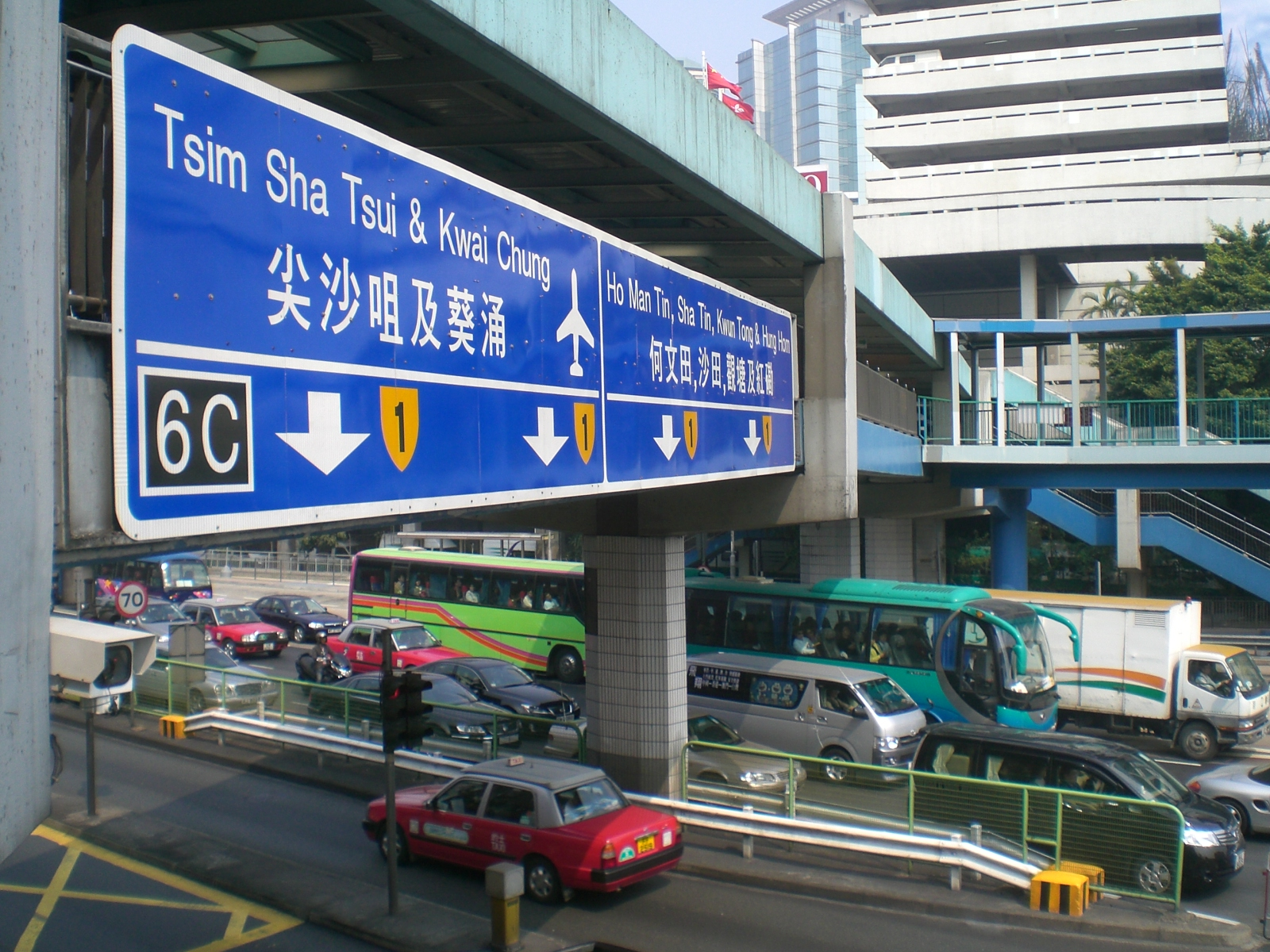 香港1號幹線, 紅磡香港海底隧道行人天橋